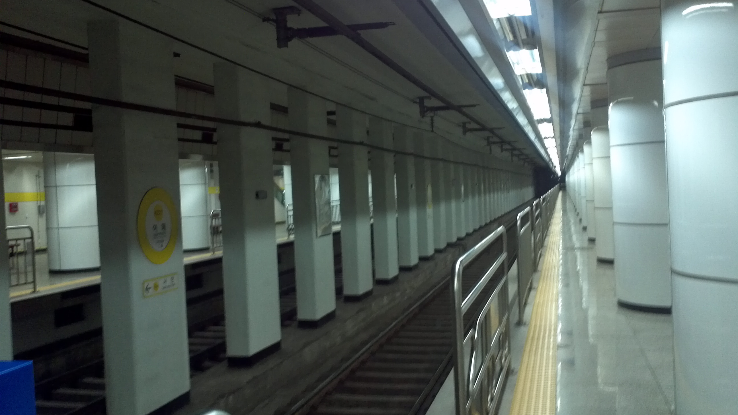 이매역 역명판